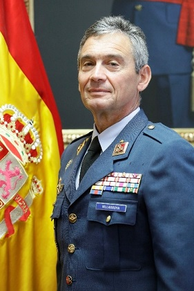 General Miguel Ángel Villarroya Vilalta